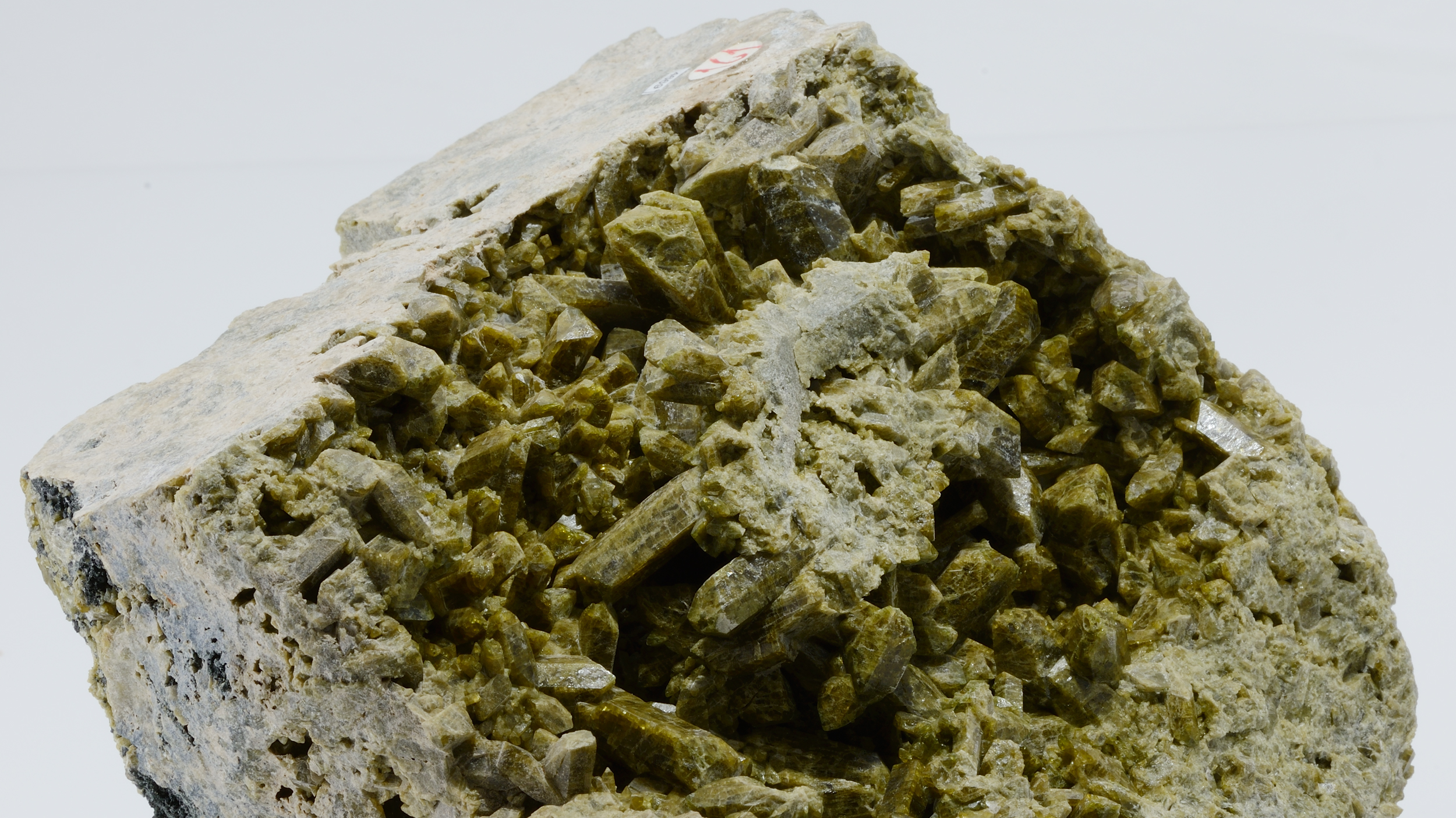 Fassaite: campione di 20 x 22 cm.